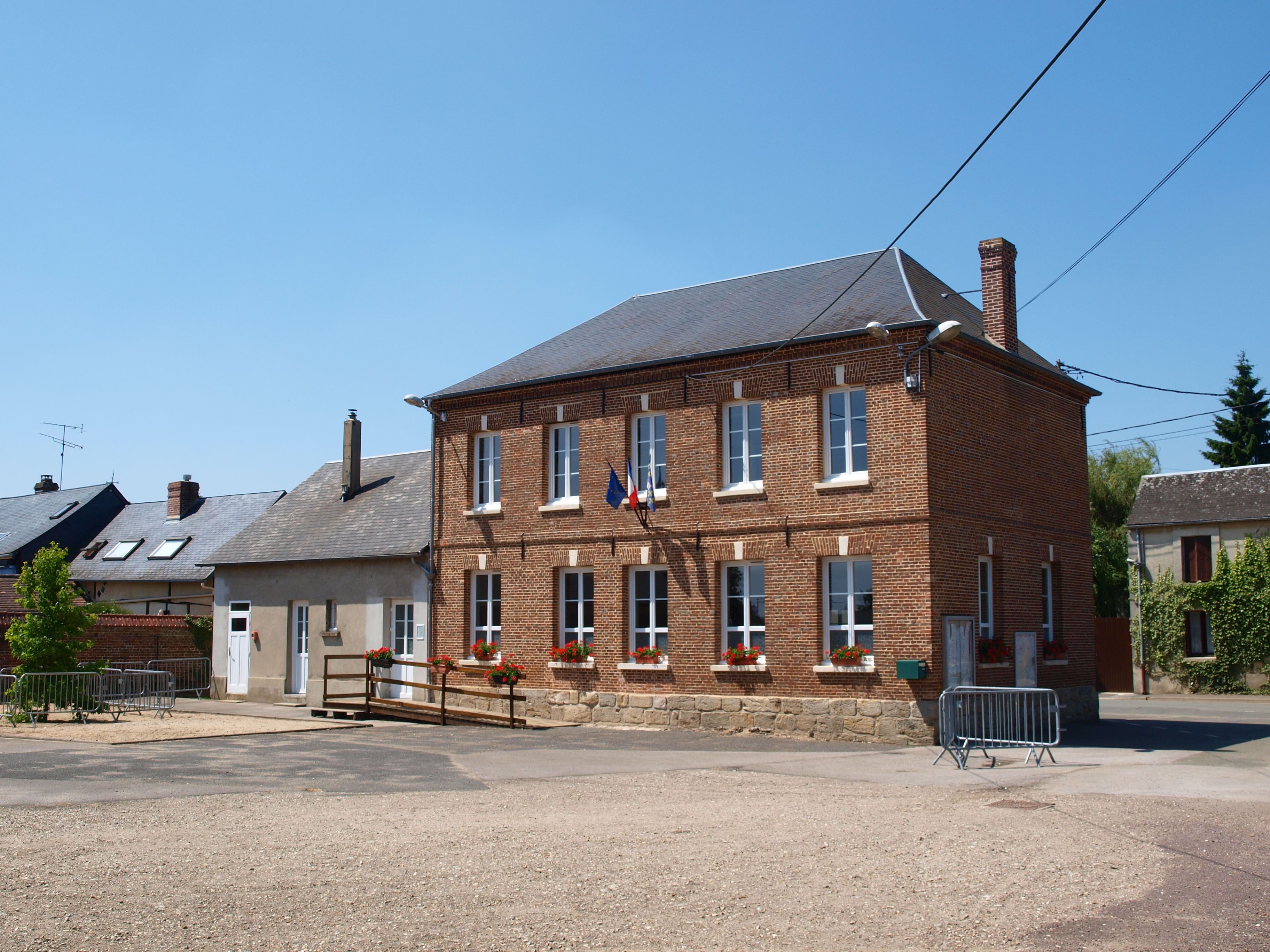 Saint-Maure (Oise, France) ; mairie vue de l'arrière , côté de l'accès pour les administrés.